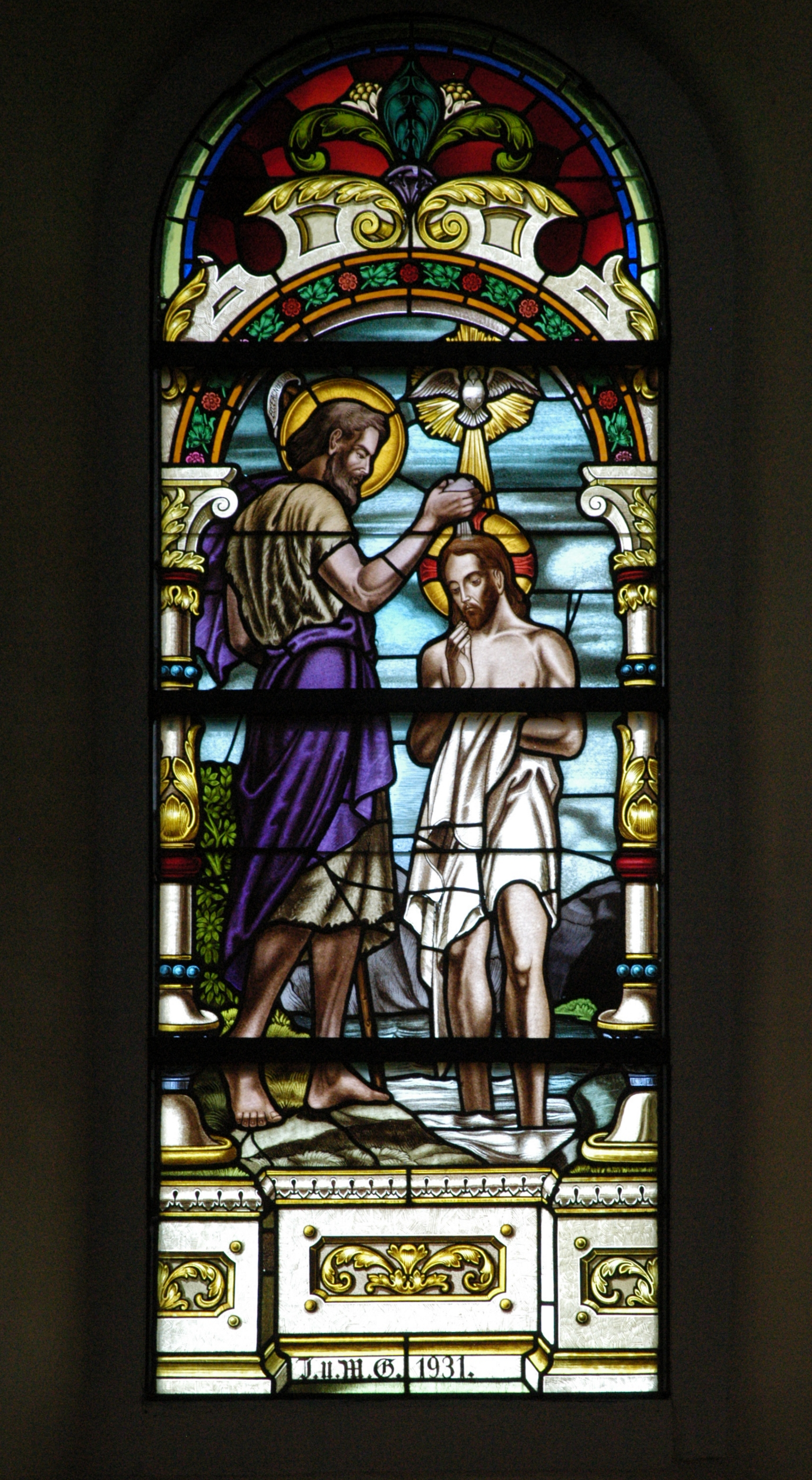 Glasfenster in der Kath. Pfarrkirche hl. Jakobus d. Ä.